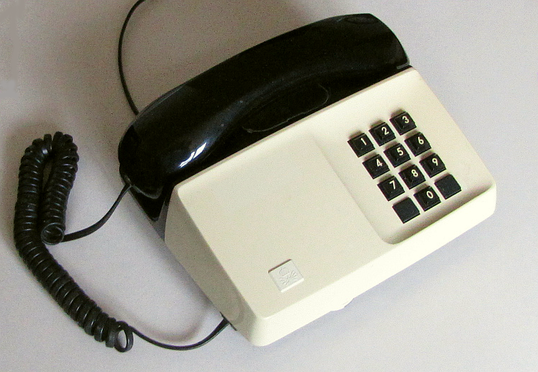 Diavox med knappsats med tio knappar för pulsval och volymratt på framsidan. Ericsson/Teli.